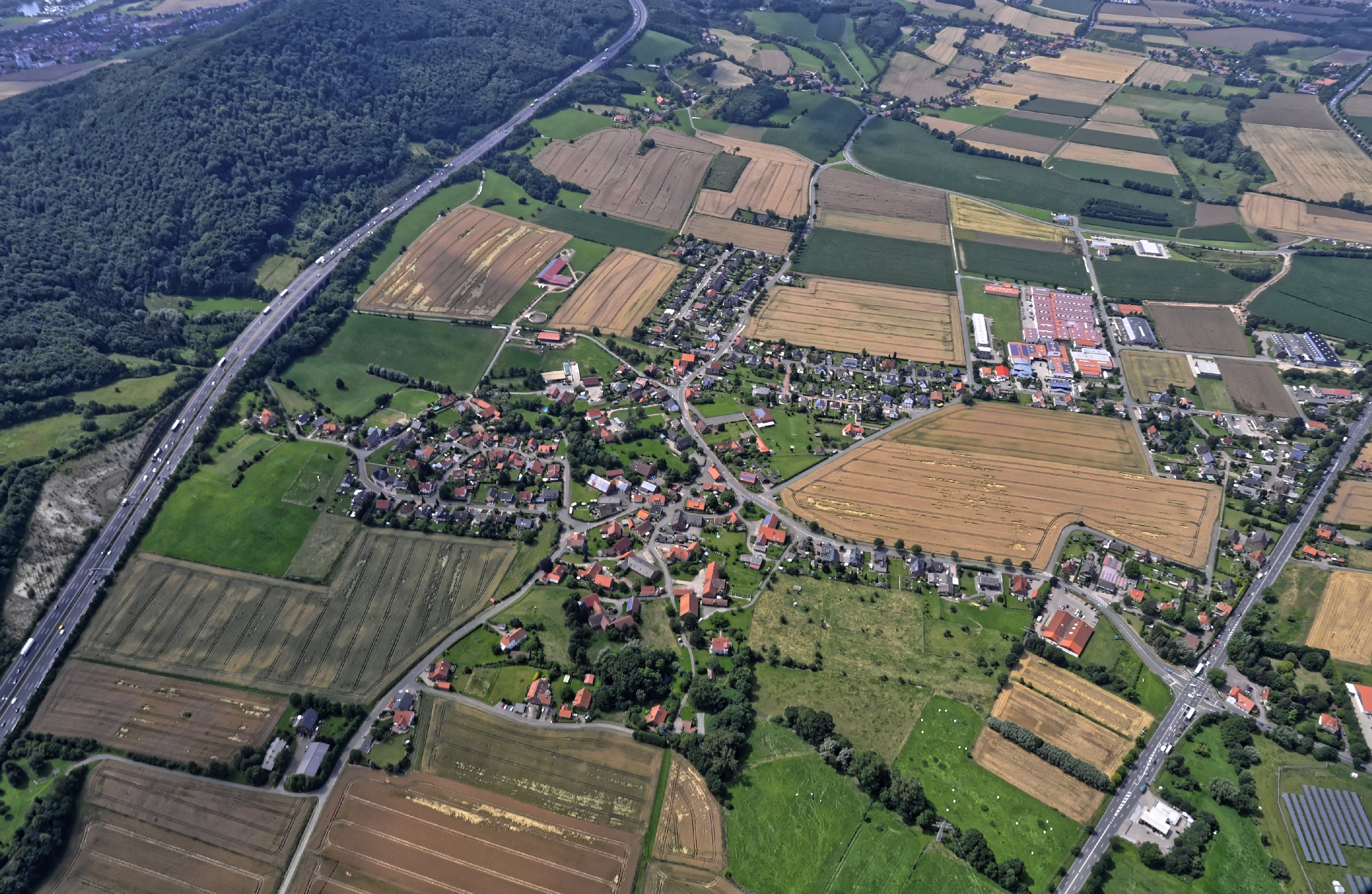 Bilder vom Flug Nordholz-Hammelburg 2015: Luhden und die Autobahn A-2